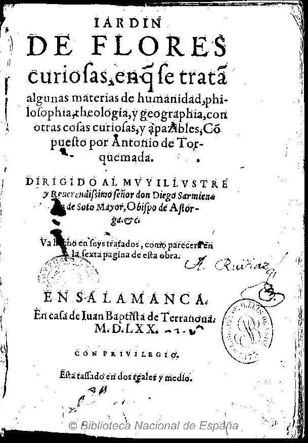 Jardín de flores curiosas Título: Iardin de flores curiosas, en q[ue] se trata[n] algunas materias de humanidad, philosophia, theologia, y geographia, con otras cosas curiosas, y apazibles co[m]puesto por Antonio de Torquemada ... va hecho en seys tratados, como parecera en la sexta pagina de esta obra Autor: Torquemada, Antonio de Fecha: 1570 Datos de edición: En Salamanca, en casa de Iuan Baptista de Terranoua (Terranova, Juan Bautista de (fl. 1567-1576).)